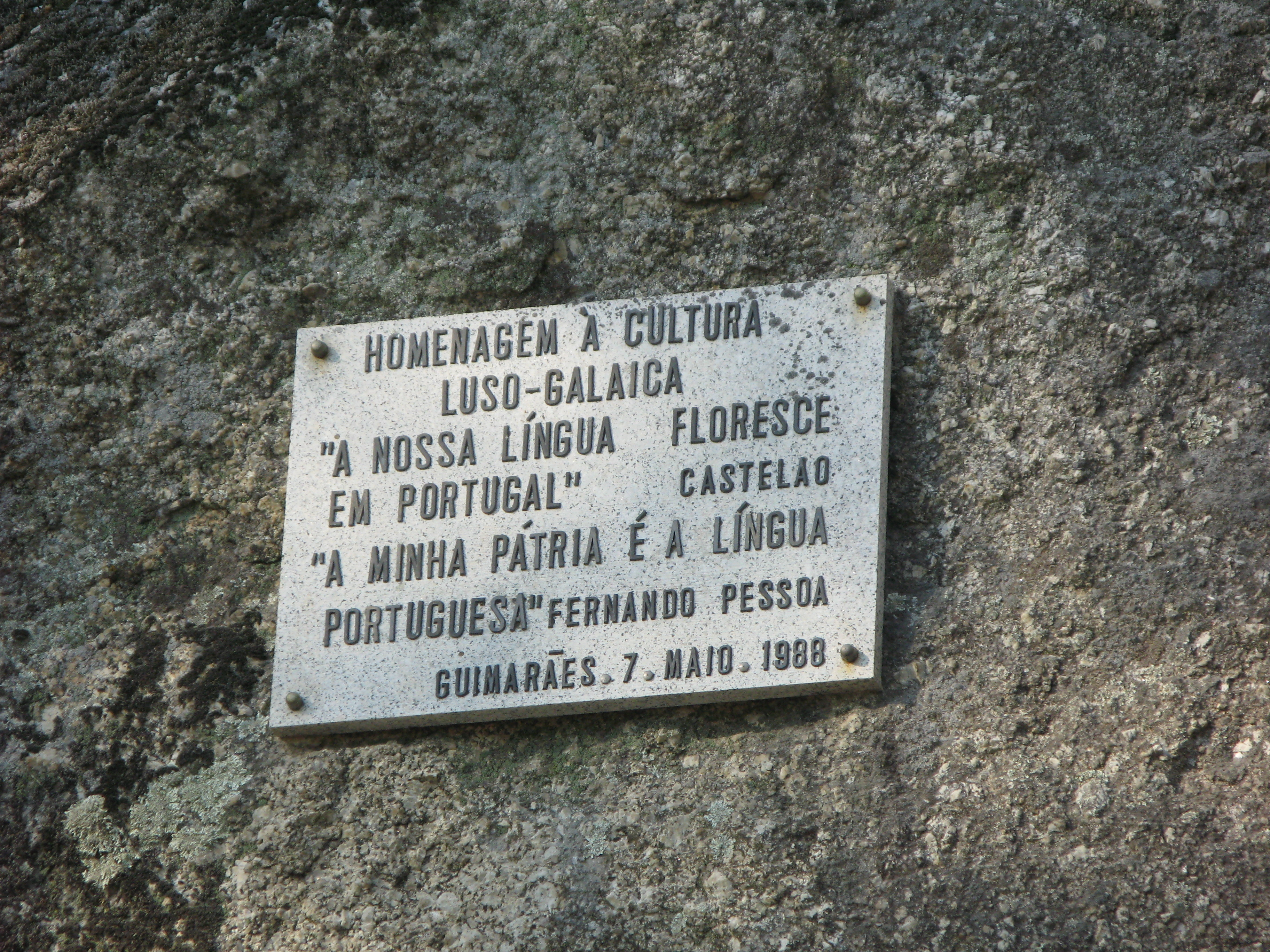 IExterior do Castelo de Guimarães, localizado na Colina Sagrada, em Guimarães.